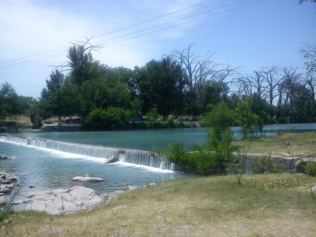 el rio de san jun de sabinas